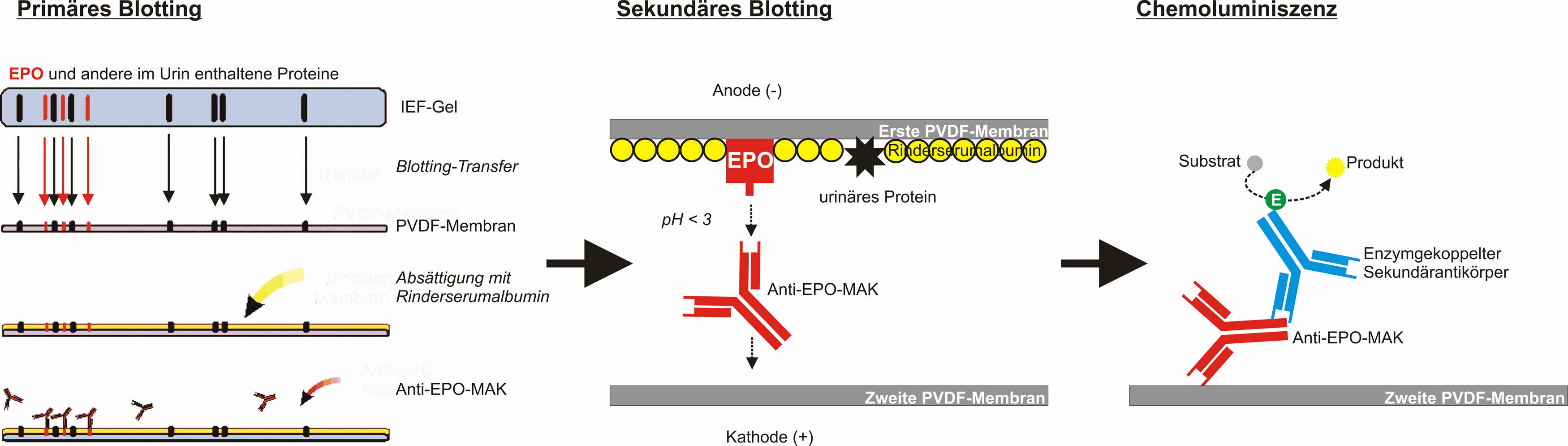 Mehrschrittblottingverfahren zur Bestimmung von EPO-Varianten